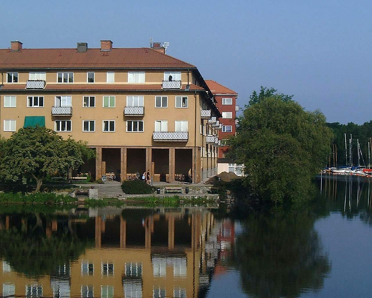 A grill at Reimersholme, Stockholm, Sweden